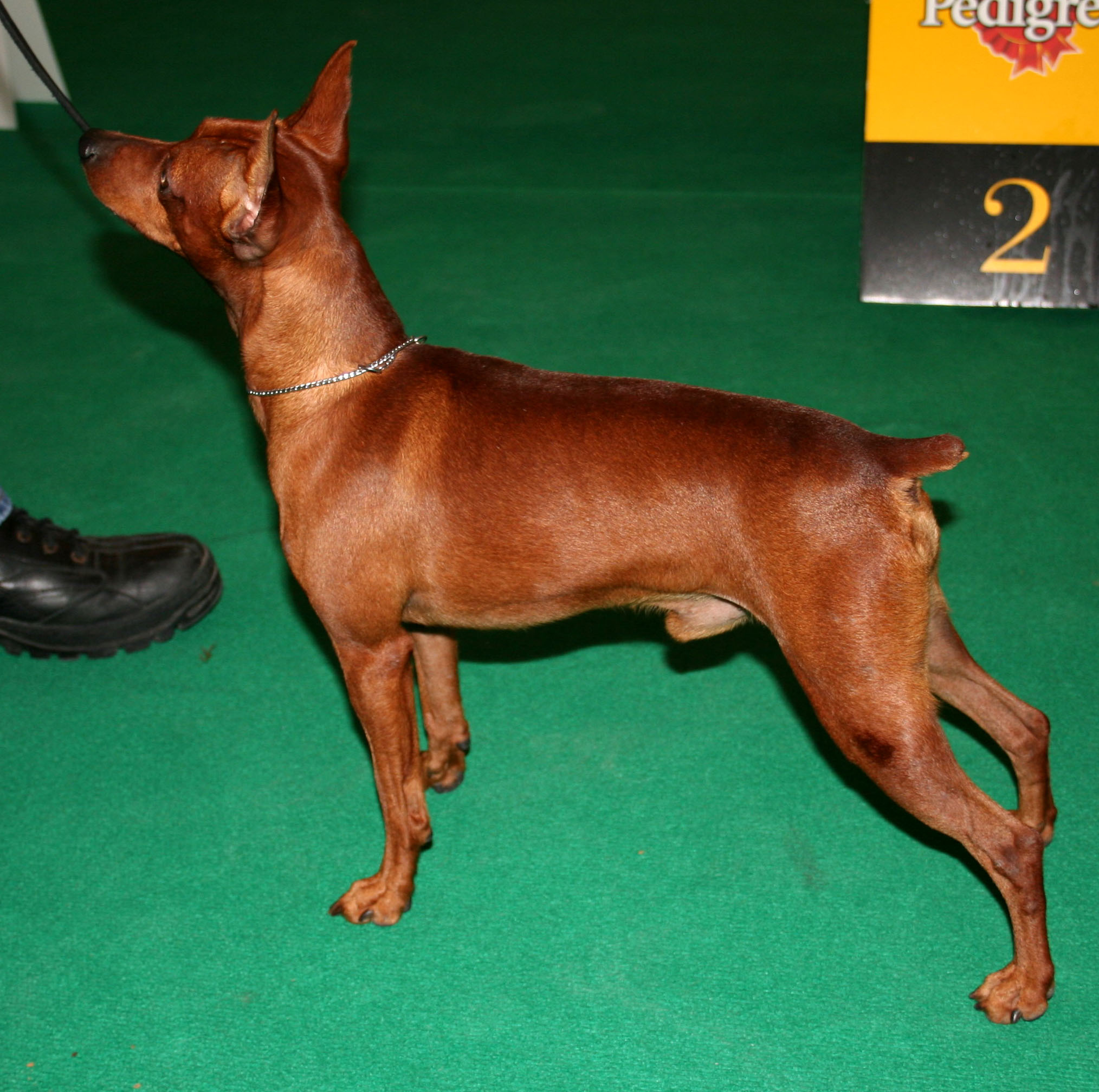 Pinczer_miniaturowy na Światowej Wystawie Psów Rasowych w Poznaniu